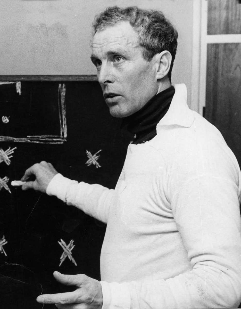 Kaj Christiansen